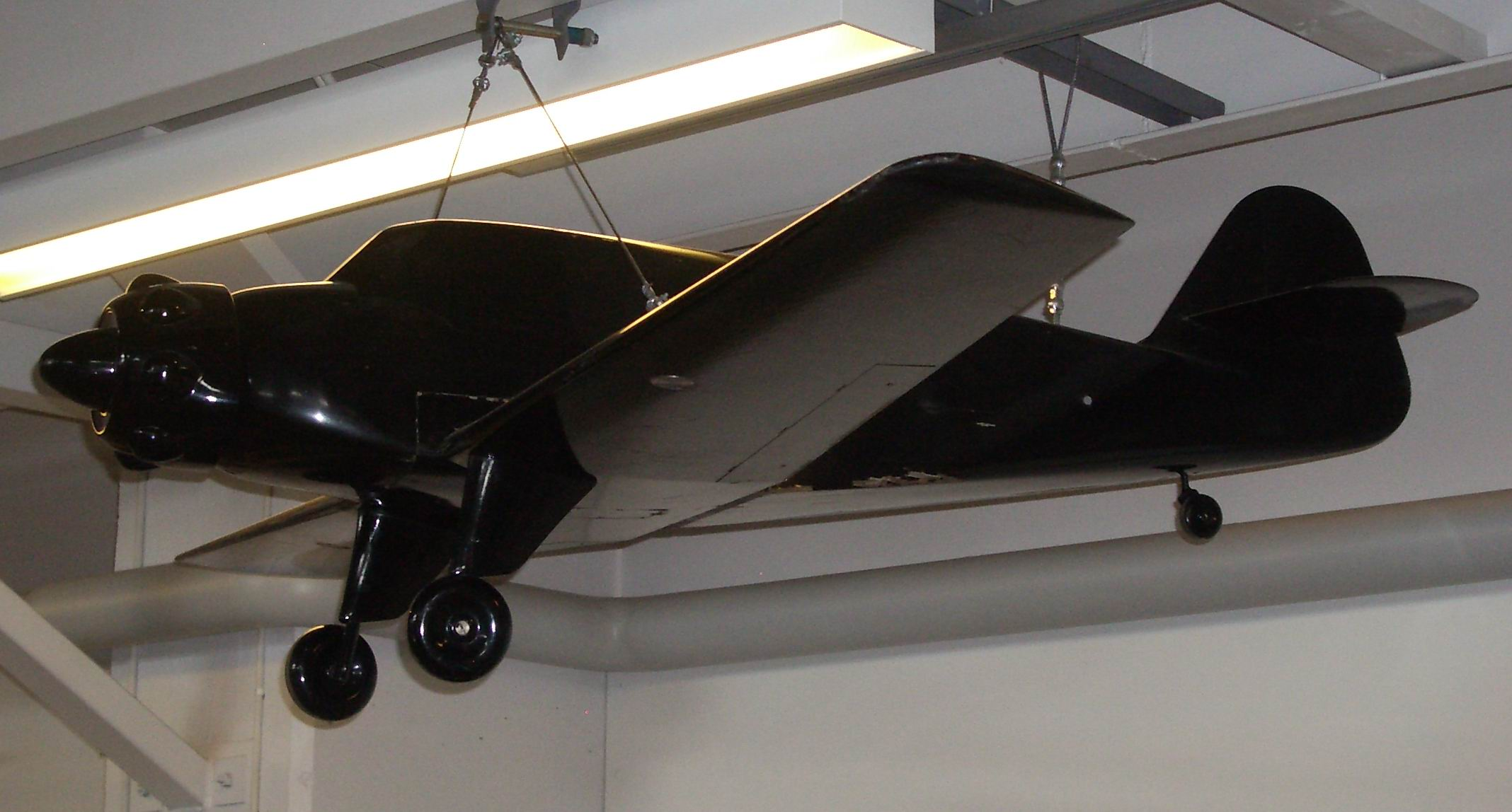 Suomalaisen Tuuli-koululentokoneen tuulitunnelimalli Keski-Suomen Ilmailumuseossa v. 2006.